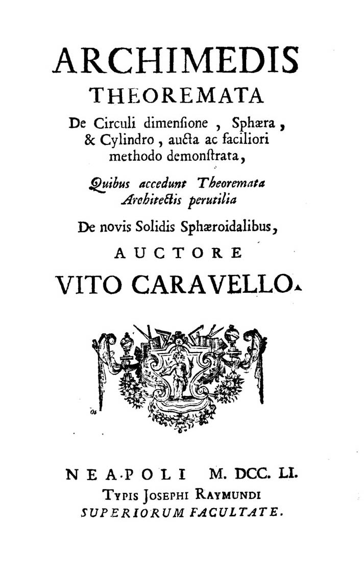 Archimedis Theoremata de circuli dimensione, sphaera, & cylindro, aucta ac faciliori methodo demonstrata, quibus accedunt theoremata architectis perutilia de novis solidis sphaeroidalibus, auctore Vito Caravello. - Neapoli : typis Josephi Raymundi, 1751. - [4], 176, [i.e. 166], [2] p., 8 c. di tav. ripiegate : ill. calcografiche ; 8º .